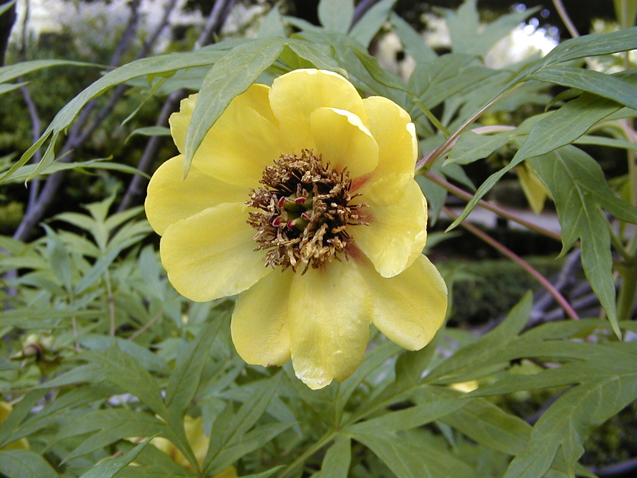 Paeonia lutea. Real Jardín Botánico, Madrid